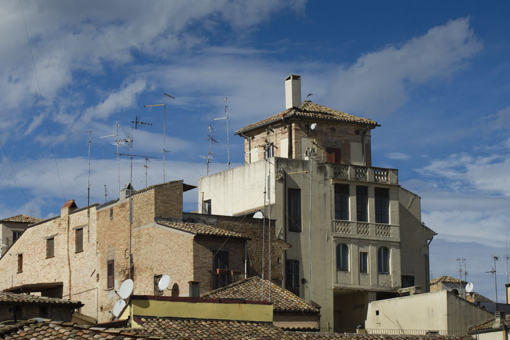 Veduta del quartiere Civitanova da Piazza del Malvò.